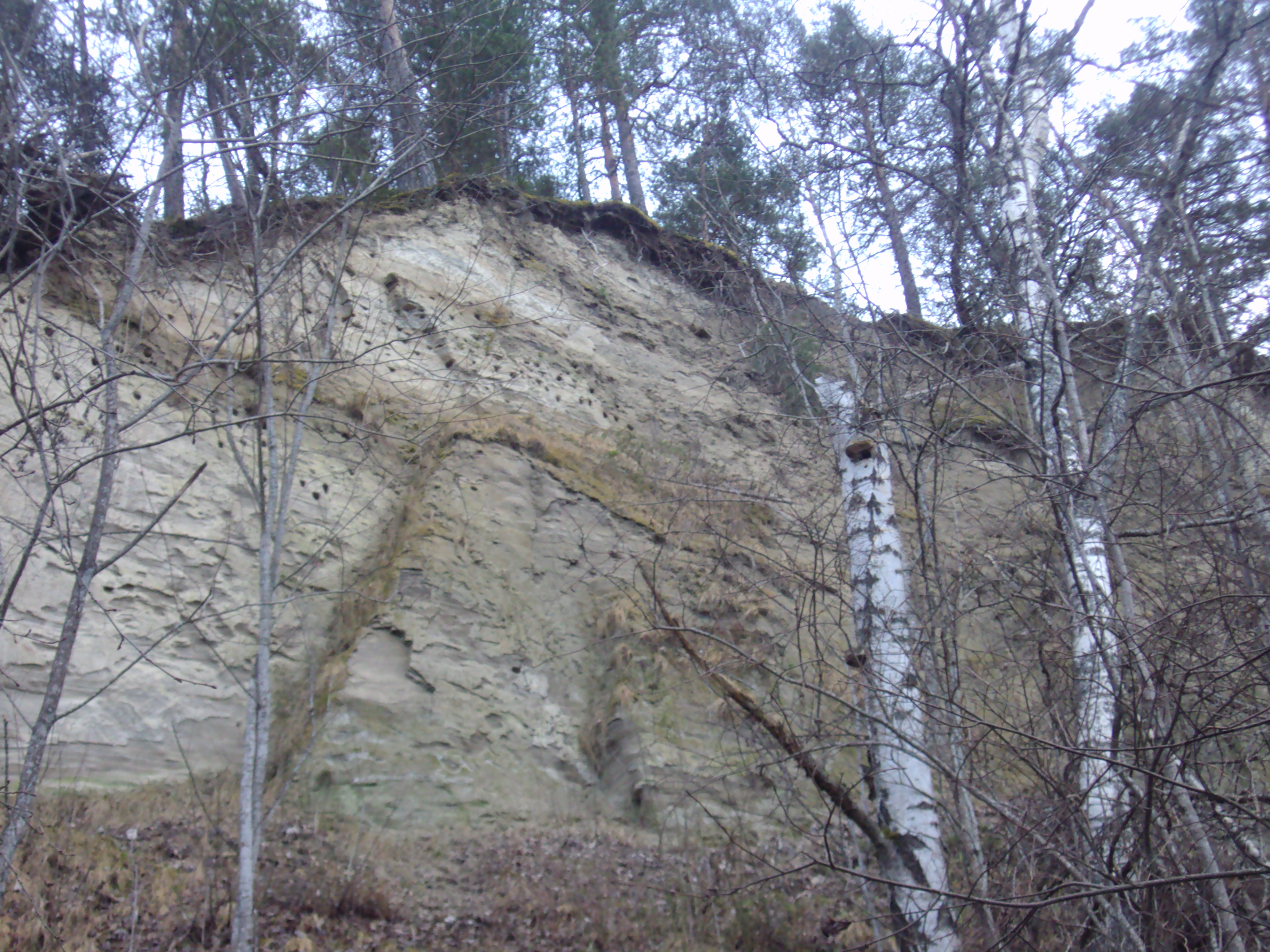 Svalnipan utanför Sollefteå